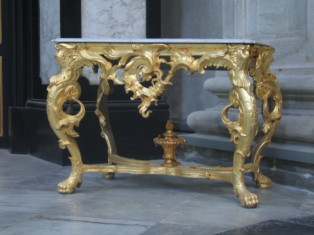 Eigen foto